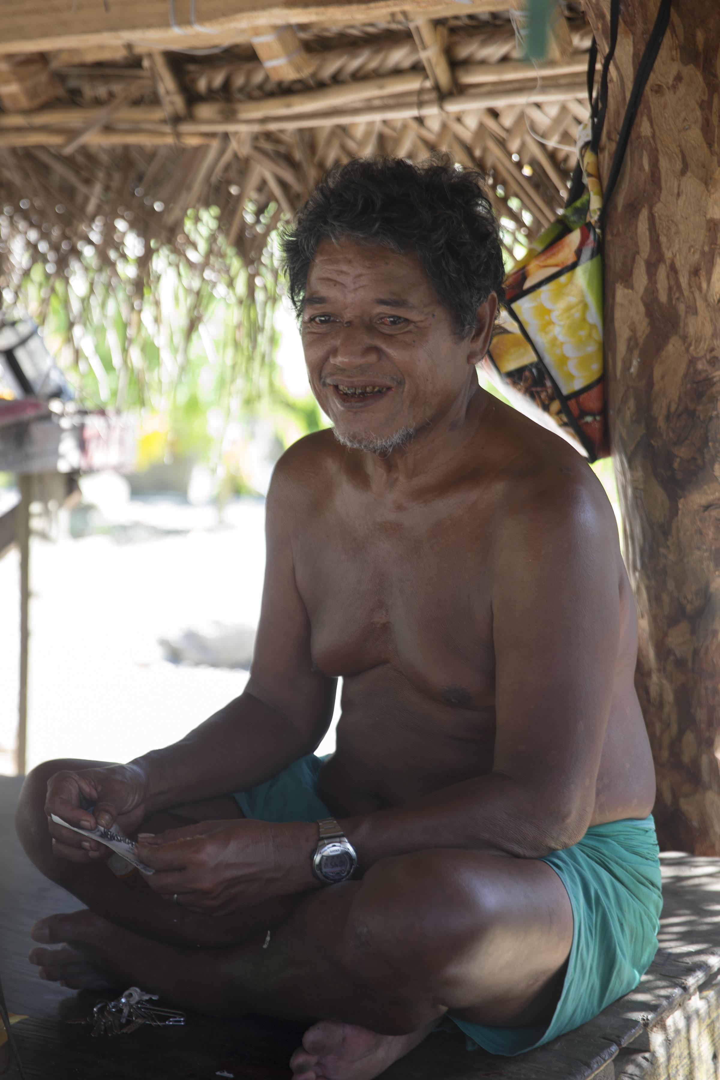 Louis Mangtau, chef de l'île de Fais